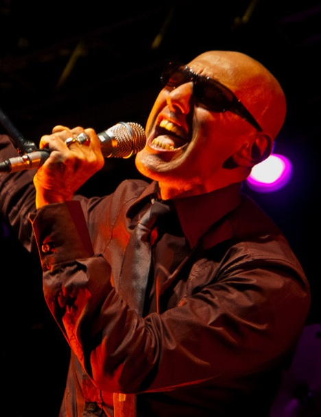 Italian singer Giuliano Palma. Terni 2 Ottobre 2010. Notte Bianca